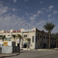 אזור תעשיה בחורה